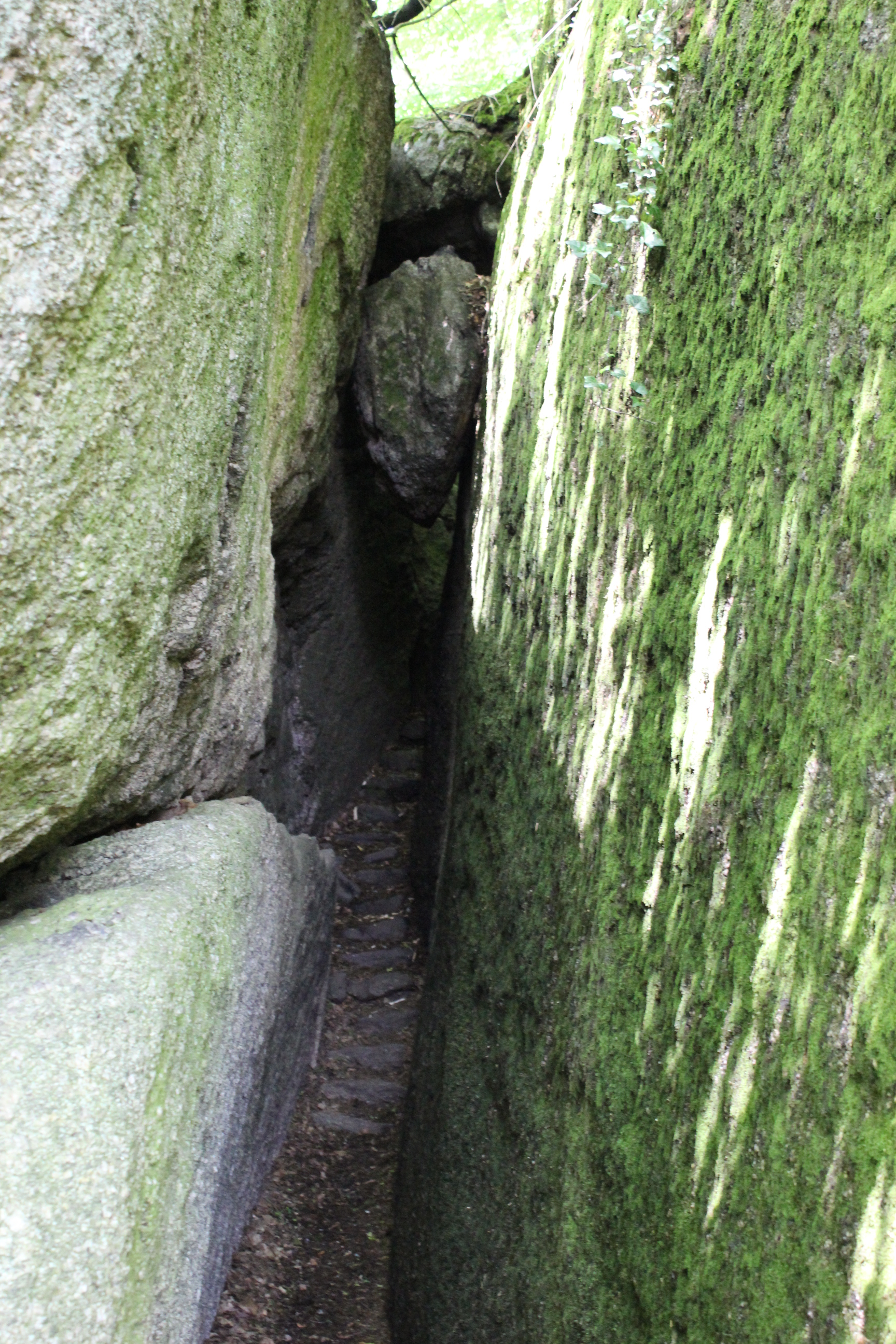 Das Herzbeutel-Gässchen im Felsengarten bei der Burg Falkenstein im Landkreis Cham, Oberpfalz. Geotop-Nr. 372R048.